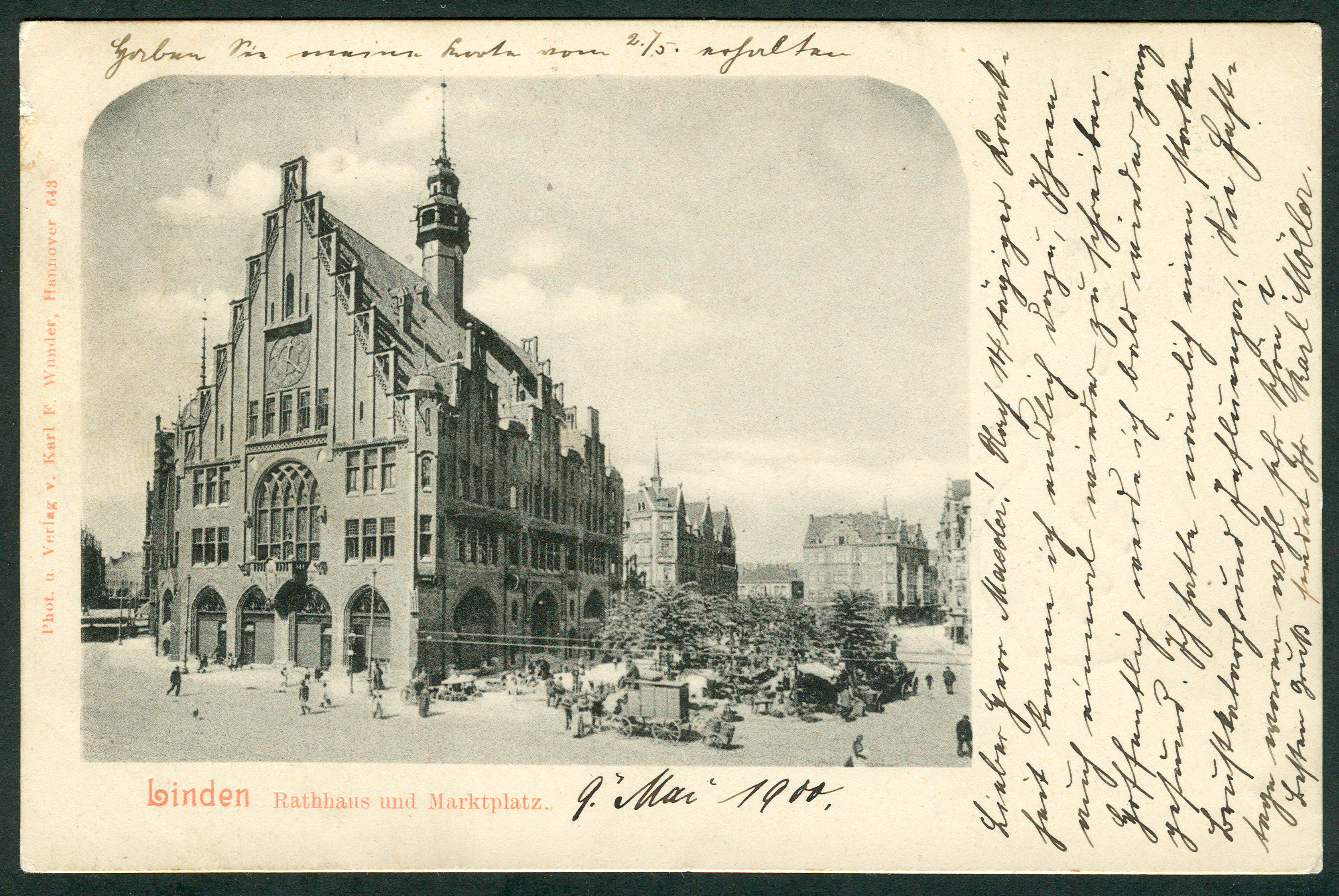 Ansichtskarte der um 1900 noch selbständigen Stadt Linden mit dem soeben fertiggestellten Neuen Rathaus und dem Lindener Marktplatz.